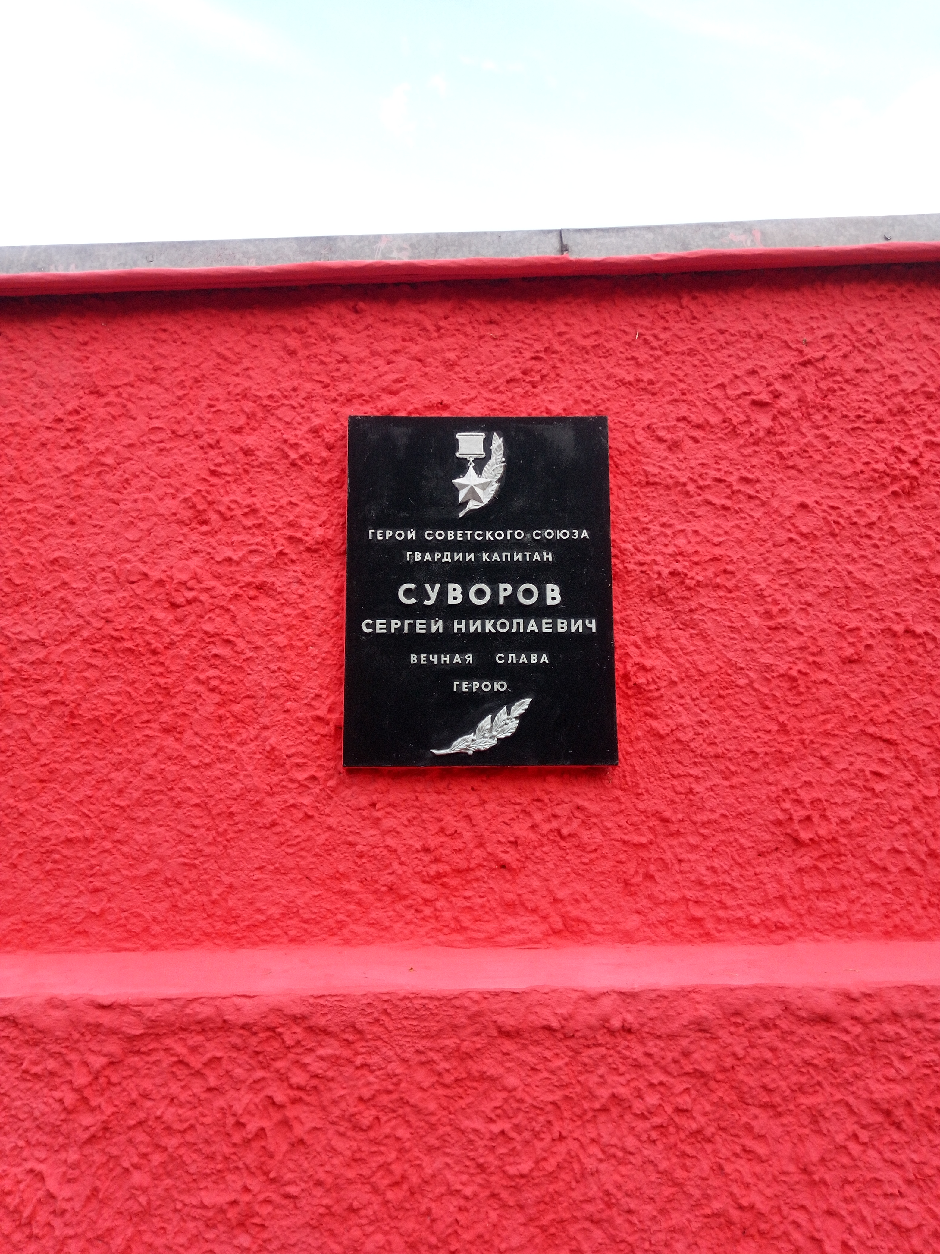 Мар’іна Горка. Мемарыял 8-ай танкавай дывізіі